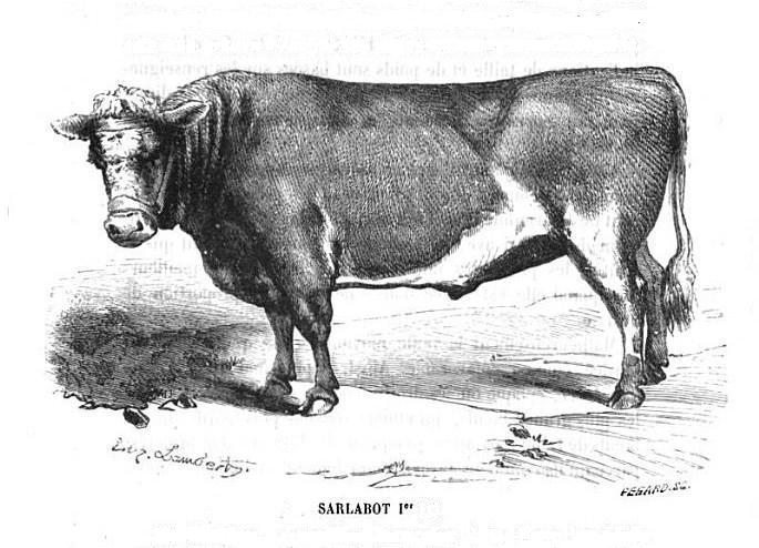 Portrait du Bœuf Gras Sarlabot Ier, publié par le Journal d'agriculture pratique en 1857. Il est repris pour illustrer deux brochures sur Sarlabot : Rapport de M. Magne et lettre de M.M. les membres du syndicat de la boucherie de Paris sur Sarlabot et Rapport sur Sarlabot Ier bœuf de la race Cotentine sans cornes.